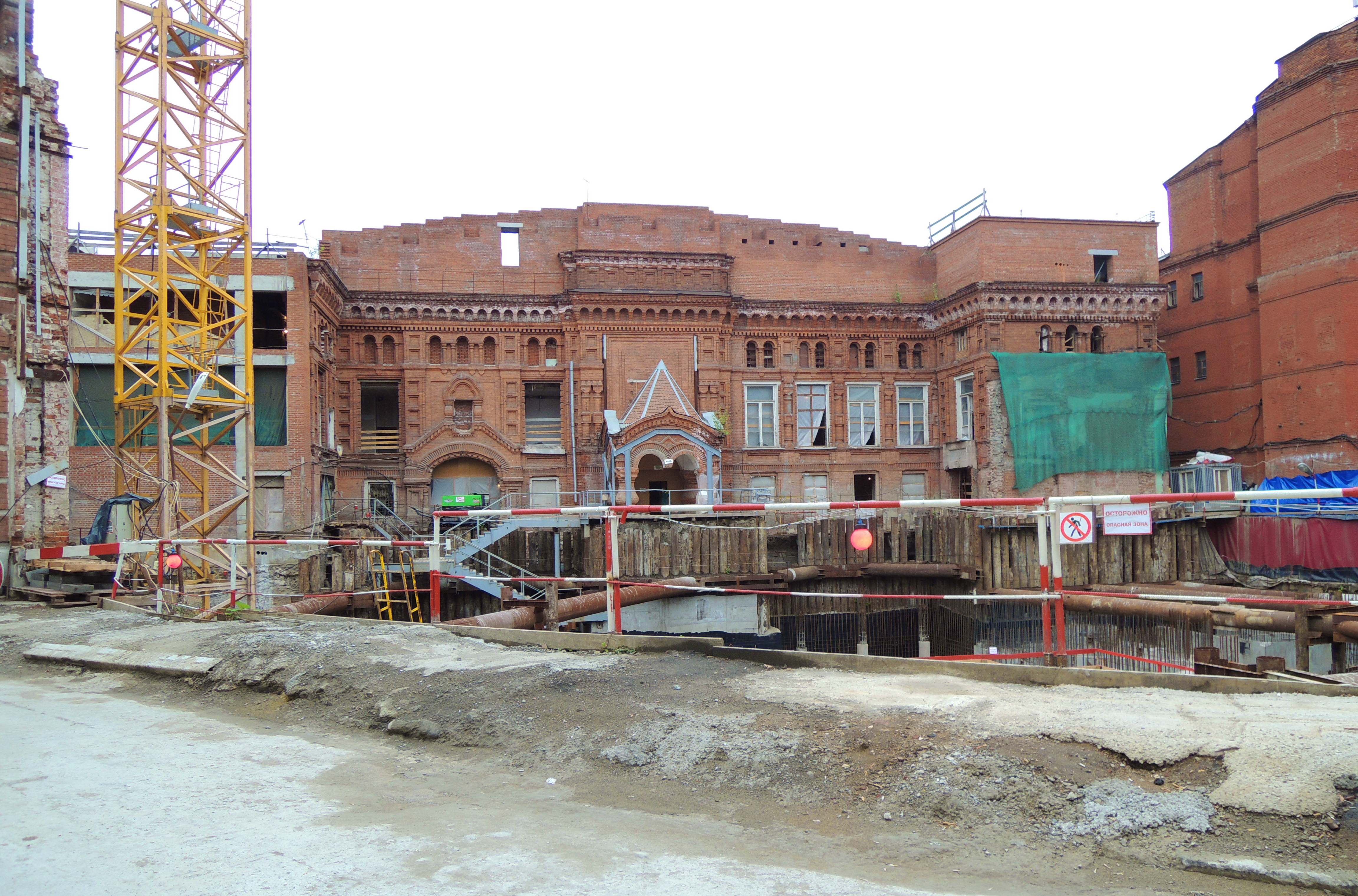 Helikon Opera